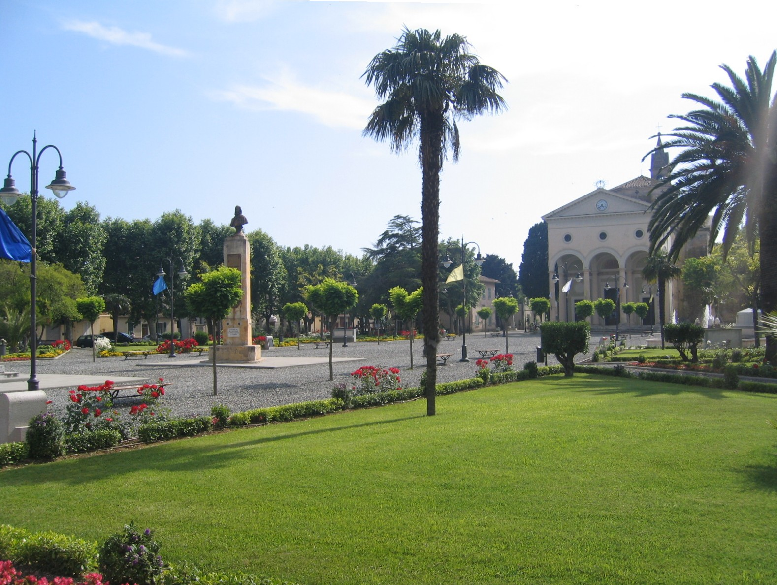 Rosignano Marittimo, Tuscany, Italy - Vada, Piazza